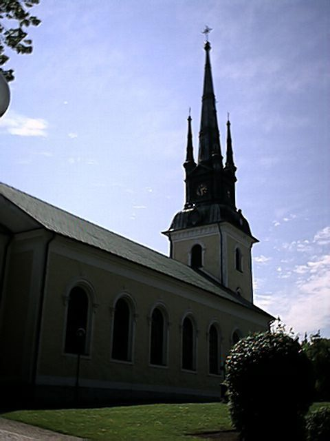 Borrby kyrka. Fotograf: Väsk.